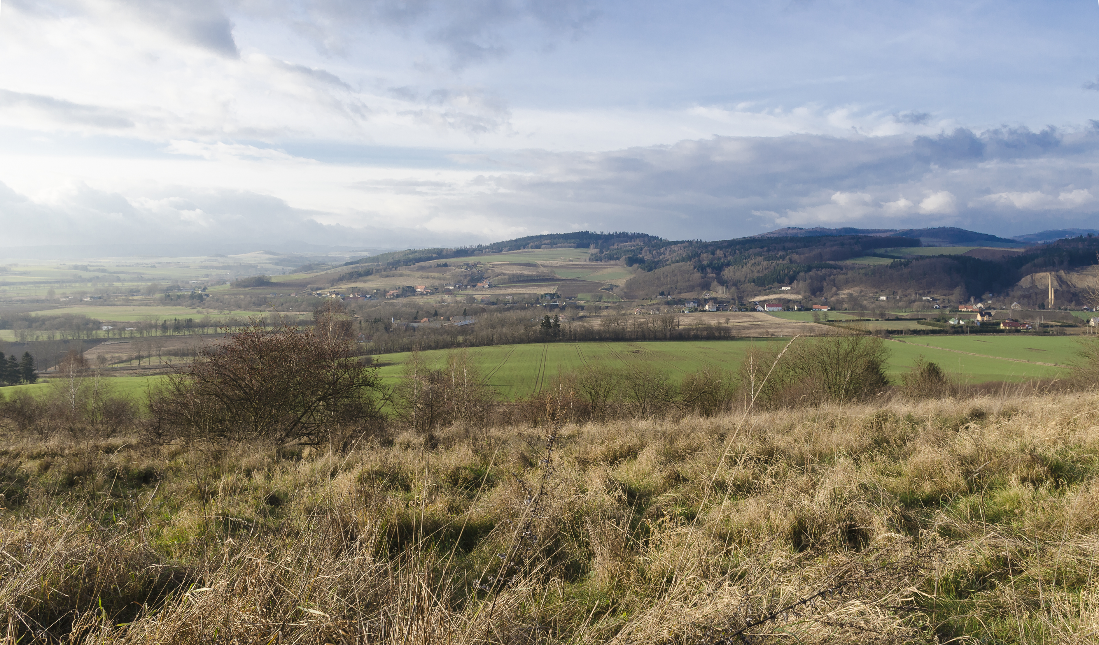 Widok na Młynów i Ławicę z Boguszyna